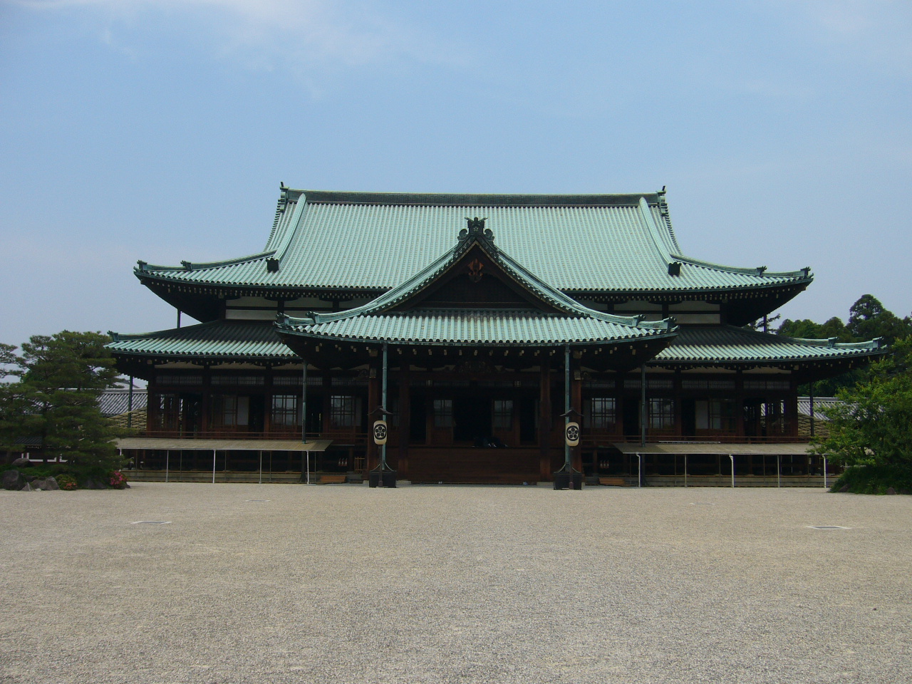 Oyasama's Residence（天理教教祖殿）